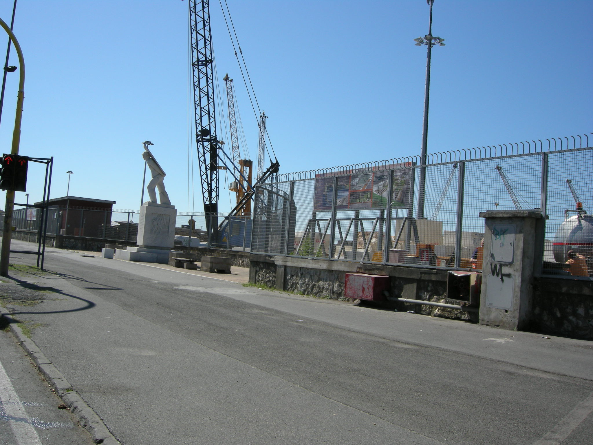 Marina di Carrara, monumento ai cavatori